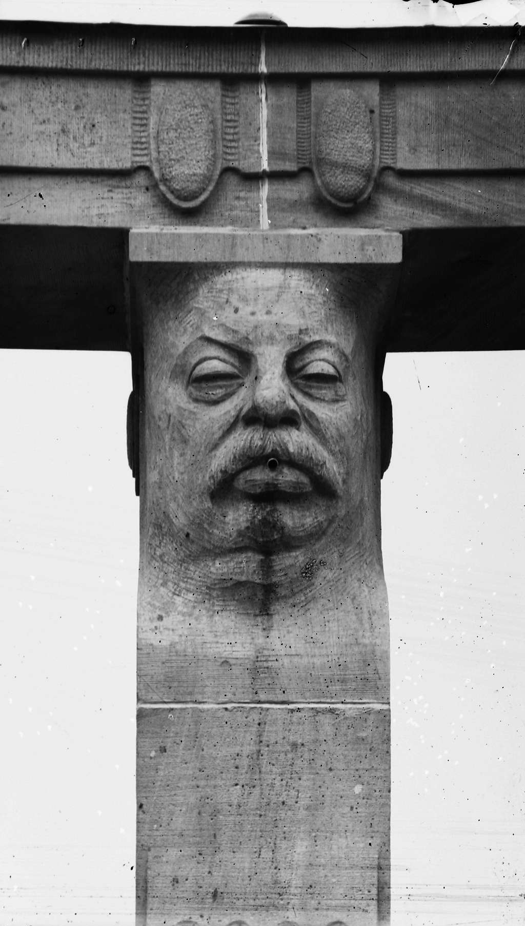 498-1 Glasnegative Wilhelm Kratt (1869-1949) - Landesamt für Denkmalpflege, Außenstelle Karlsruhe / 1. Hälfte 20. Jahrhundert, vor allem 1910-1930 Orte A-Z K Karlsruhe (KA) Plätze, Tore, Denkmäler, Brunnen Stephansplatz Stephansbrunnen Einzelne Köpfe KarlsruheStephanplatz - Stephansbrunnen14 Hermenköpfe - Kopf des Fotograf Karl Ruf